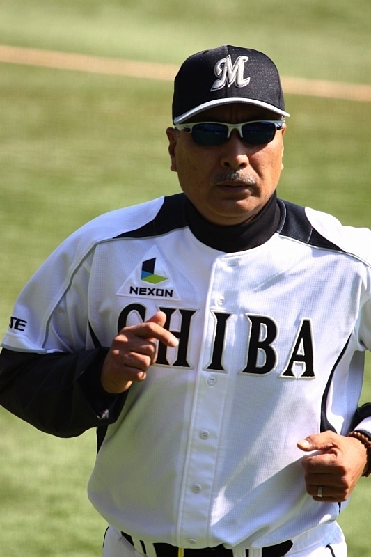 日本プロ野球 千葉ロッテマリーンズ 斉藤明雄投手コーチ